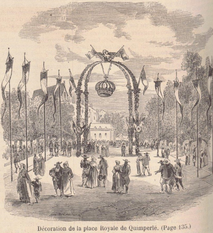 Décoration de la Place Royale de Quimperlé lors de la visite de leurs Majestés impériales en août 1858